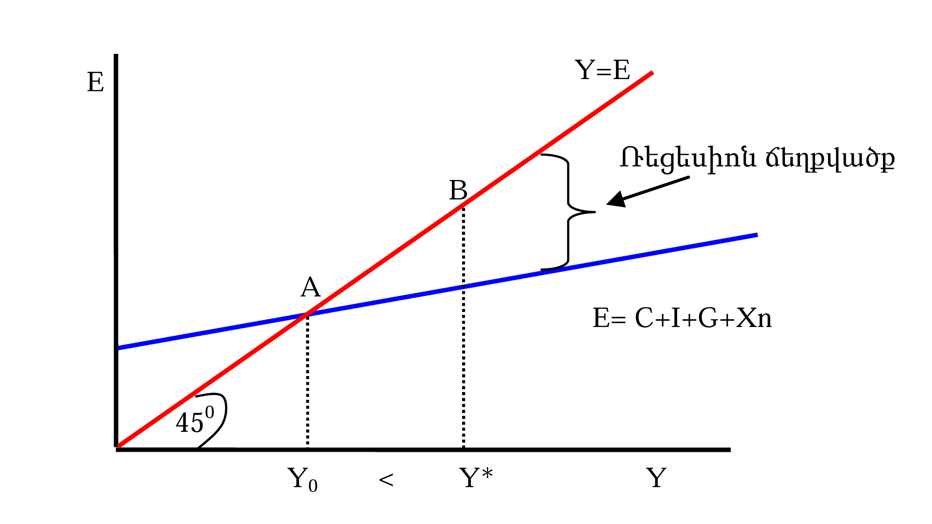 Ռեցեսիոն ճեղքվացք